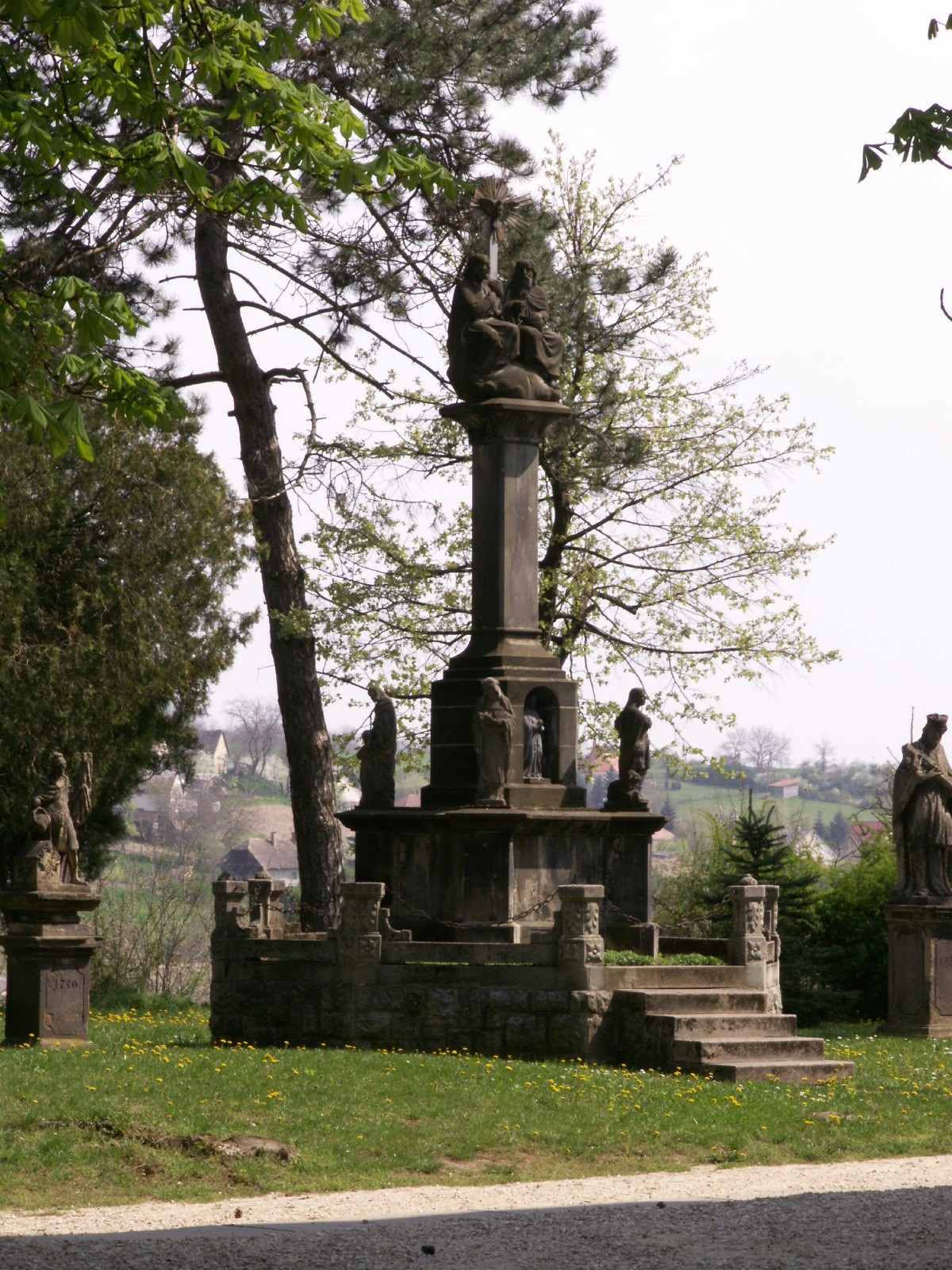 Ez a kép a teveli templom előtti Szentháromság szobrot ábrázolja. Saját magam készítettem.